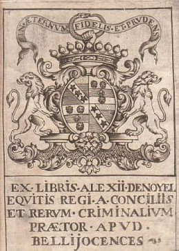 ex-libris de/of Alexis Noyel de Belleroche, dans un ouvrage du XVIIIe siècle (France) / from a 18th century french book.